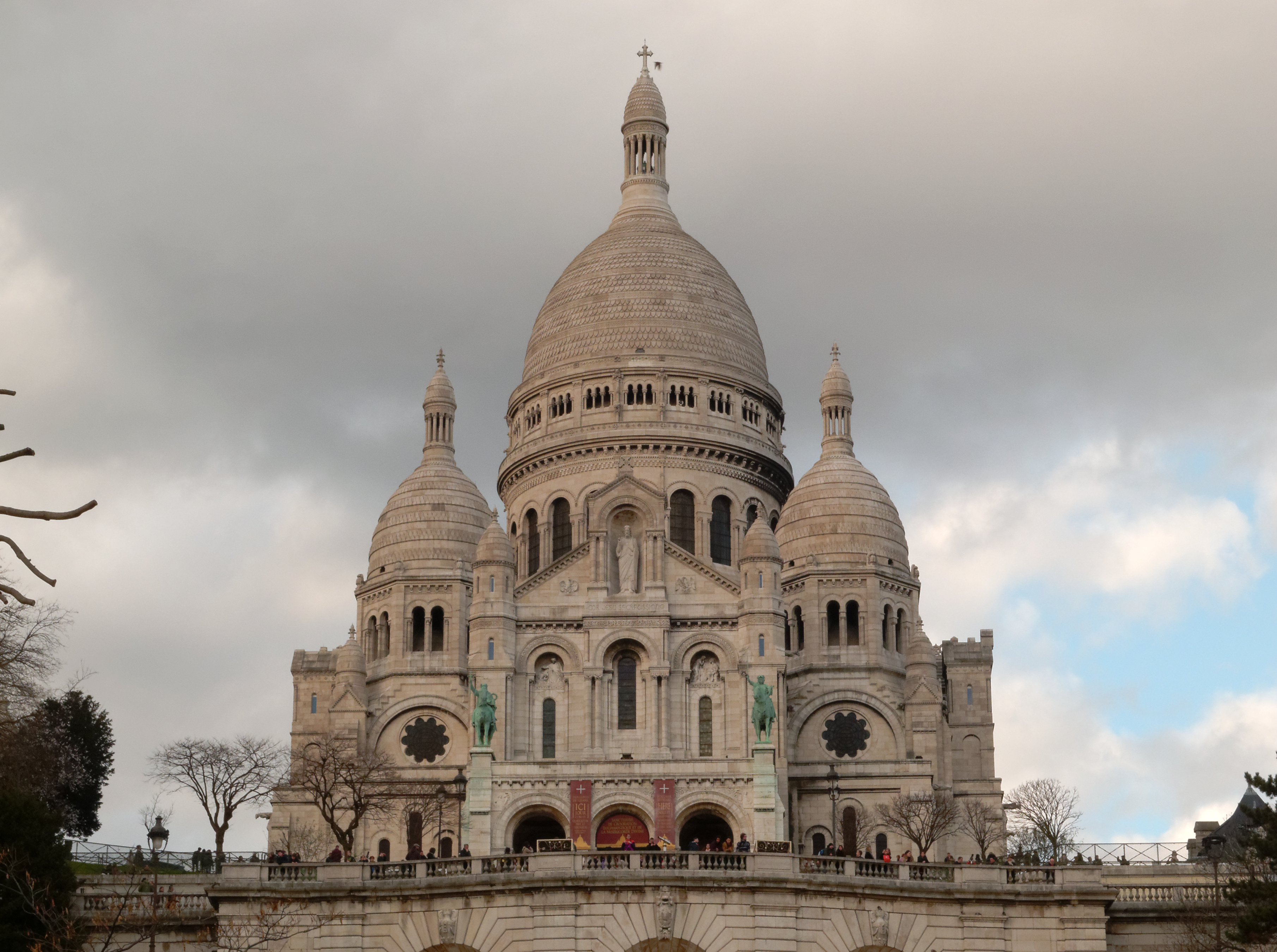 Paris : Basilique du Sacré-Cœur de Montmartre.